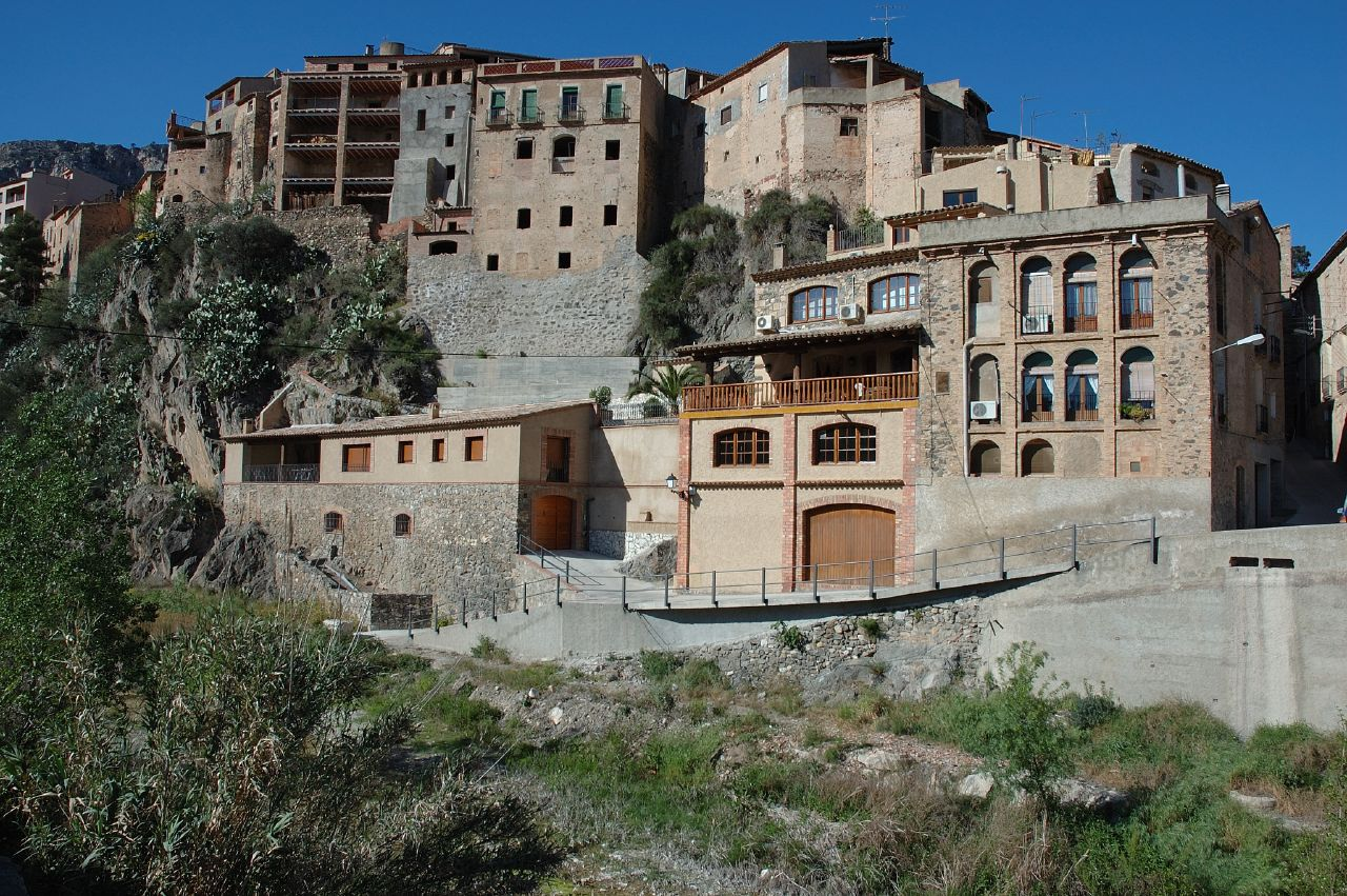 Ла-Вилелья-Баша.